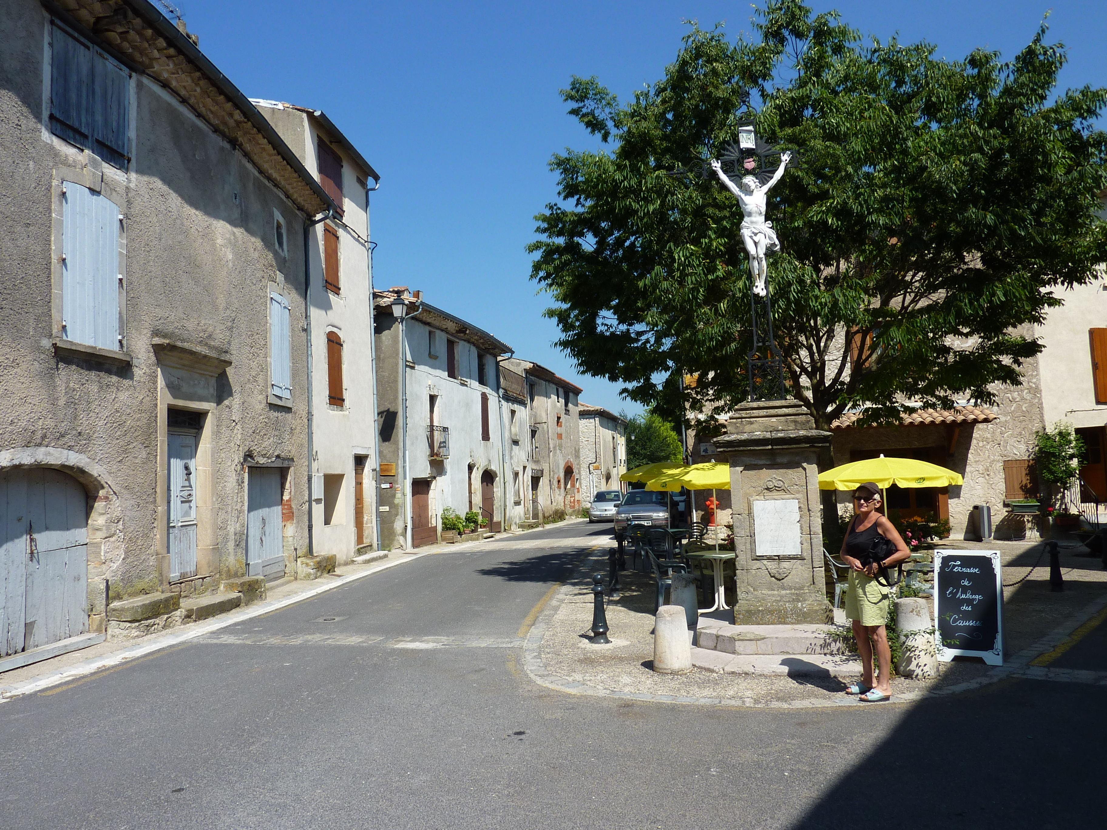 La Vacquerie-et-Saint-Martin-de-Castries: le centre du bourg (pour info : malgré le titre de la photo, La Vacquerie-et-Saint-Martin-de-Castries se situe dans l'Hérault et non dans le Gard.)